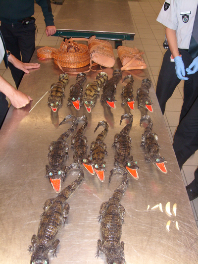 Vrijdag 10 september zijn op de luchthaven Schiphol door de Douane twee koffers onderschept met opgezette krokodillen uit Suriname met bestemming China. Er zijn twee verdachten aangehouden. Het betrof hier 13 opgezette krokodillen, 34 riemen van krokodillenleer, twee tassen van krokodillenleer en zeven tanden van katachtigen. De goederen kwamen tijdens een controleactie van de Douane aan het licht. De controleactie is een internationale actie die in samenwerking met Interpol werd geïnitieerd. Deze actie had als focus reptielen en amfibieën en is uitgezet bij circa 40 deelnemende landen. De twee verdachten zijn door de Douane aangehouden wegens het overtreden van de Wet Flora en Fauna, voorgeleid en overgedragen aan de Algemene Inspectie Dienst( AID). De krokodillen en aanverwante producten zijn inbeslaggenomen.